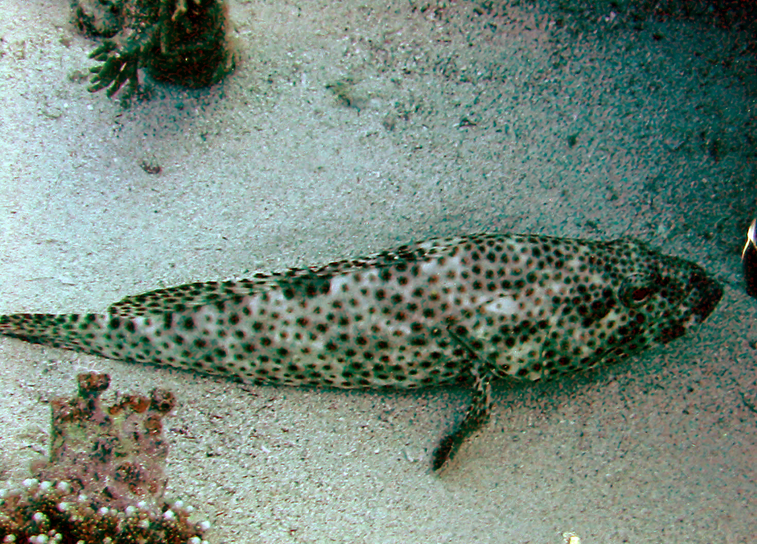 Arabian grouper epinephelus tauvina Dahab Red Sea